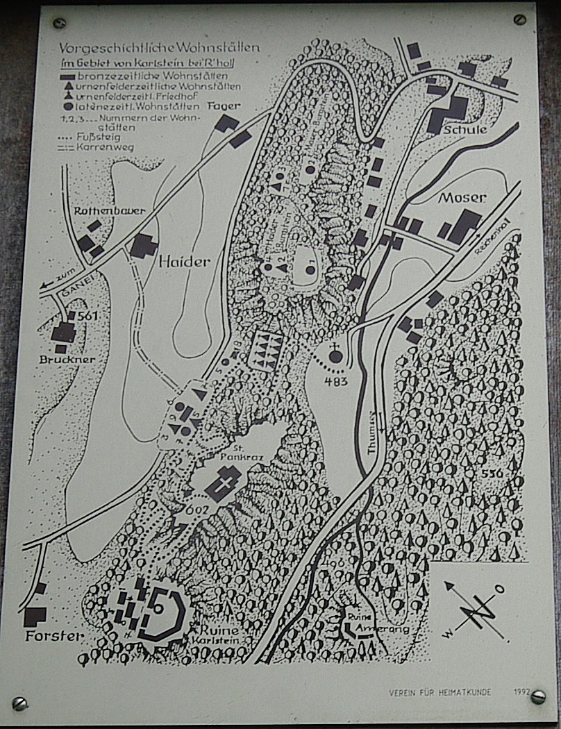 Lageplan vorgeschichtlicher Siedlungen in Karlstein